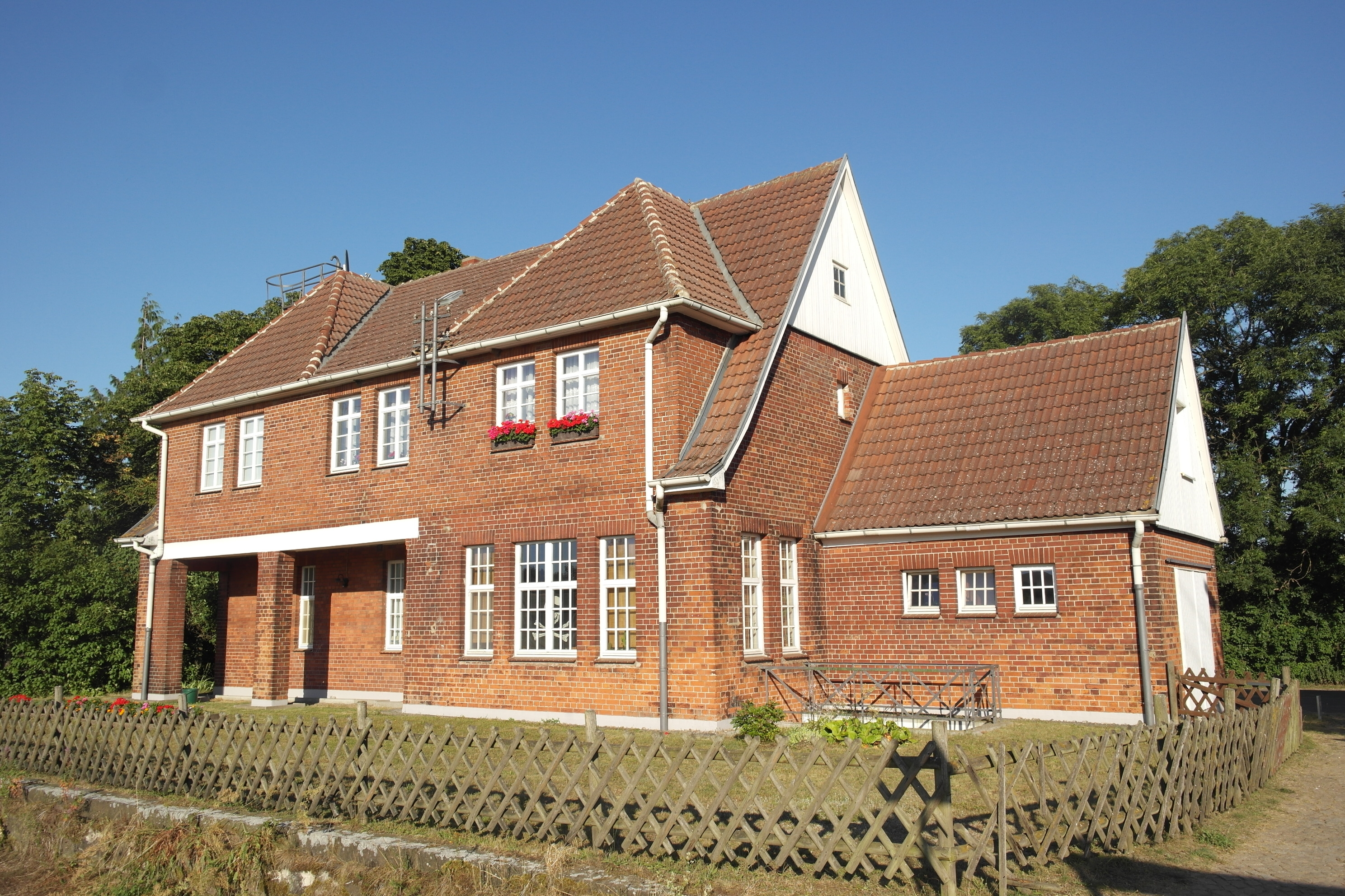 Denkmalgeschütztes Bahnhofsgebäude von Cammin (Meckl), heute Wohnhaus